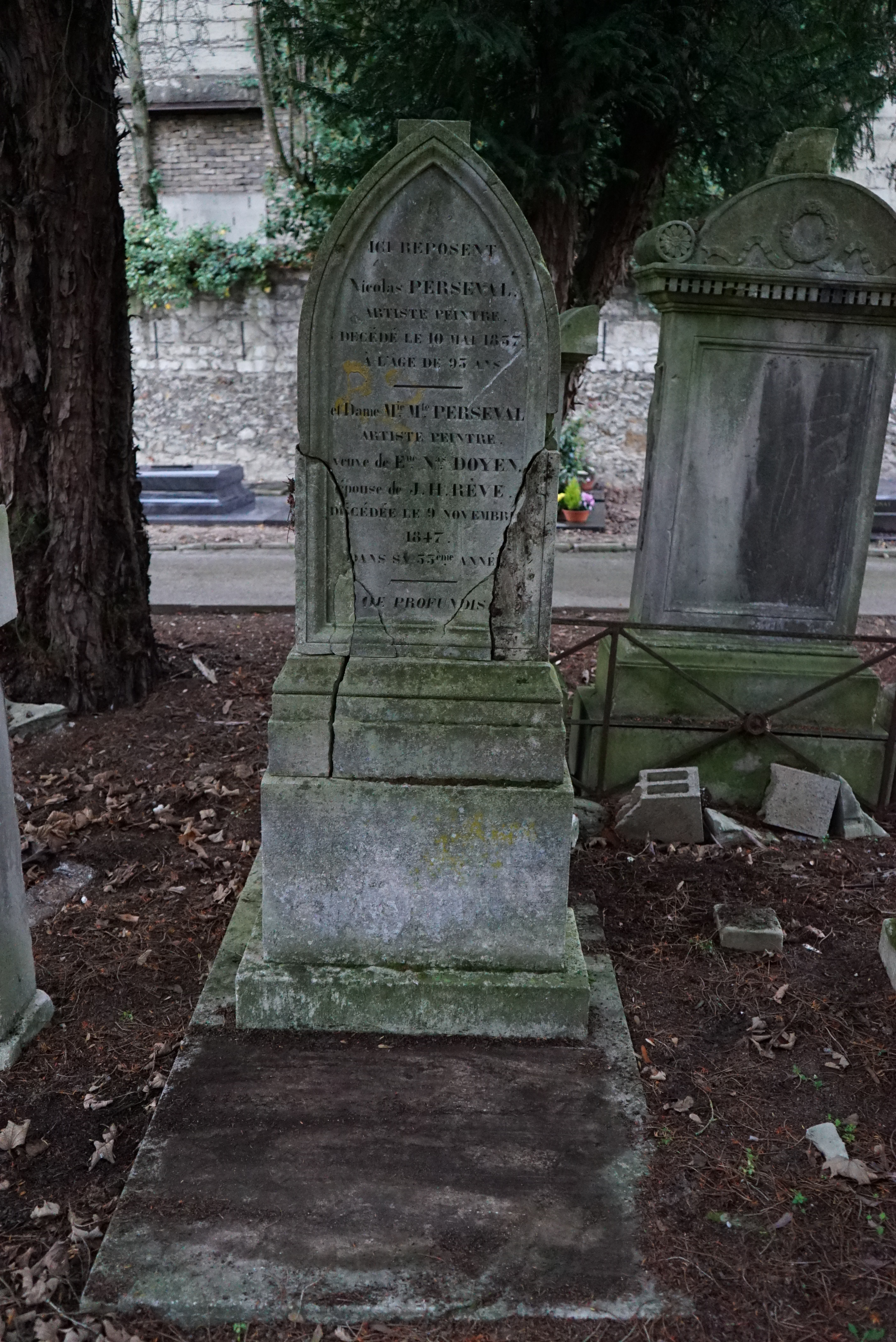 tombeau de Nicolas Perseval. canton 3